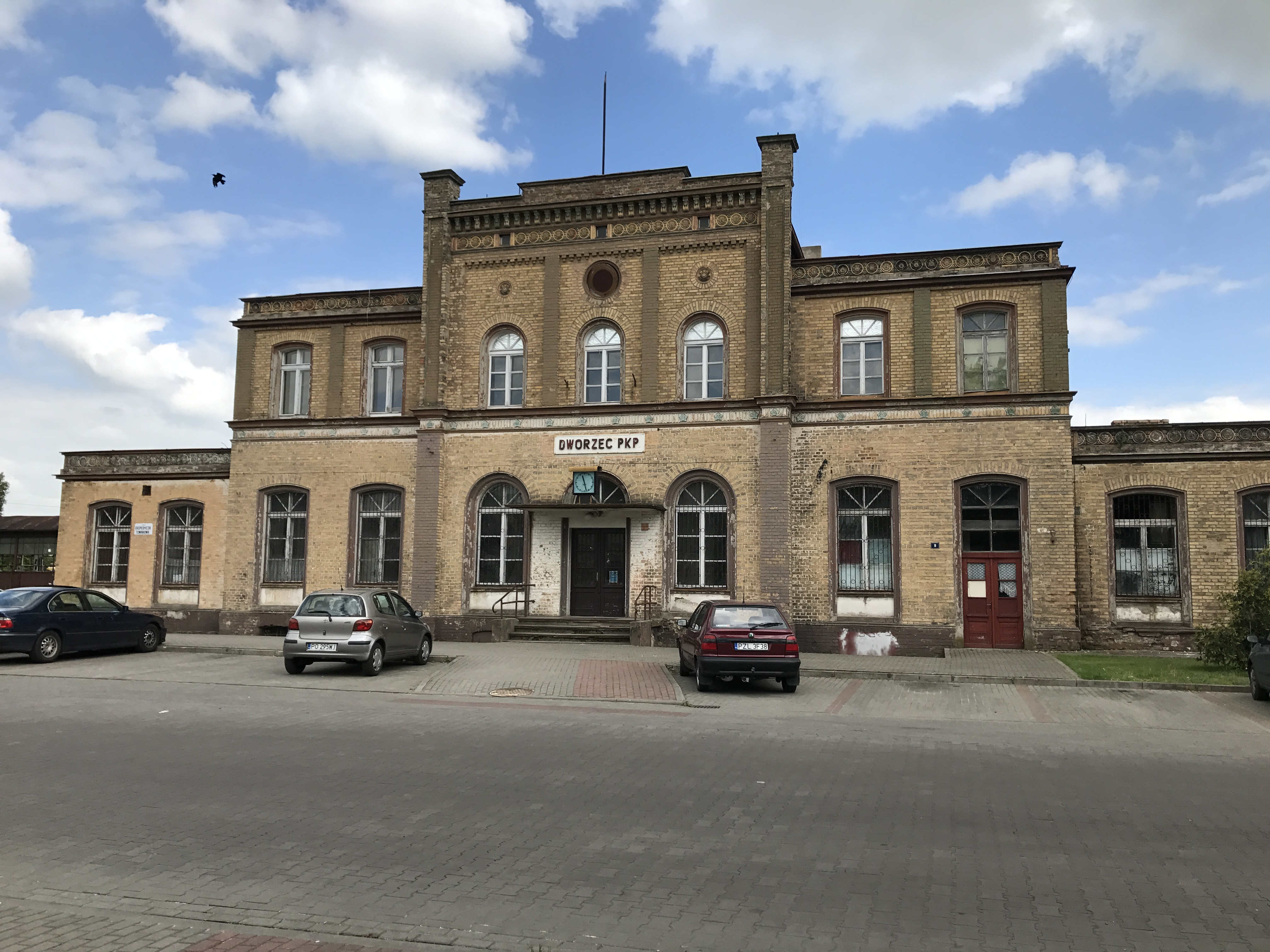 Dworzec PKP w Zlotowie.